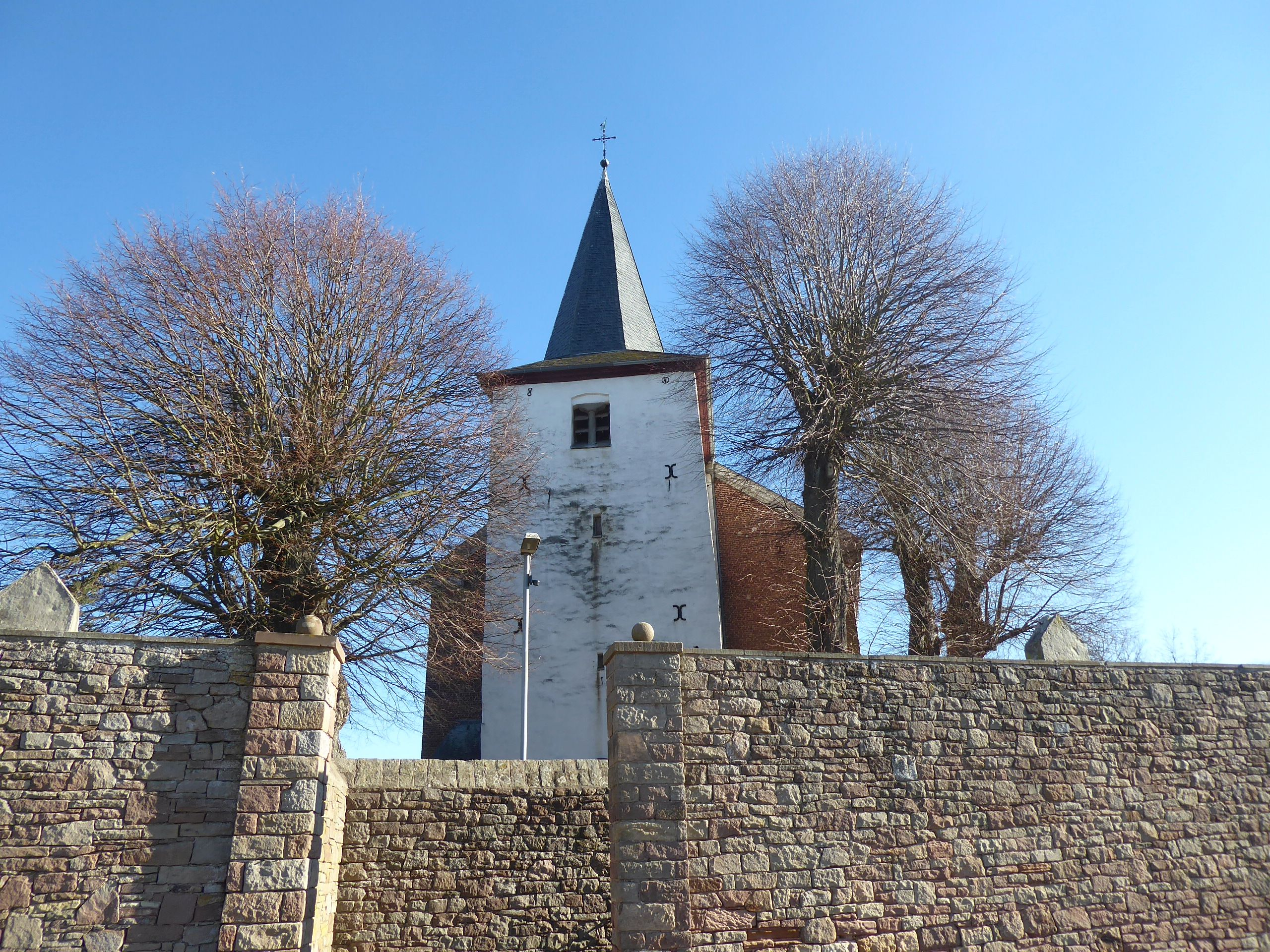 St. Lambertus (Mechernich-Holzheim)